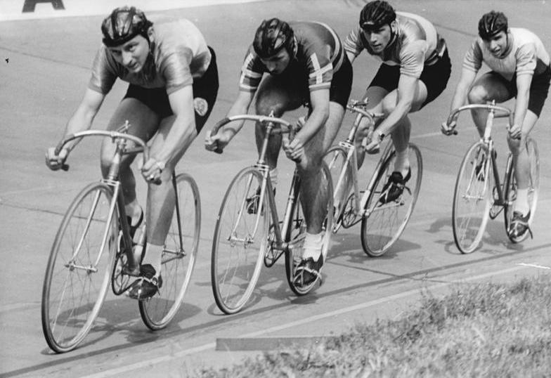 (v.l.n.r.): Manfred Klieme, Siegfried Köhler, Bernd Barleben, Wolfgang Schmelzer (Reihenfolge im April 2016 korrigiert) Zentralbild Wendorf 10.8.1961 Ks-Noa SC Einheit Berlin siegte im 4000 m-Mannschaftsfahren Für die herausragende Leistung bei den deutschen Bahn-Radsport-Meisterschaften auf der Leipziger Alfred-Rosch-Kampfbahn sorgte im 4000 m-Mannschaftszeitfahren der SC Einheit Berlin. Barleben, Köhler, Klieme und Schmelzer fuhren 4.38, 7 Min und holten sich damit den deutschen Meistertitel. Das Finale im 4000 m-Verfolgungsfahren gewann Franz (SC Motor Karl-Marx-Stadt). UBz:Die Mannschaft des SC Einheit.